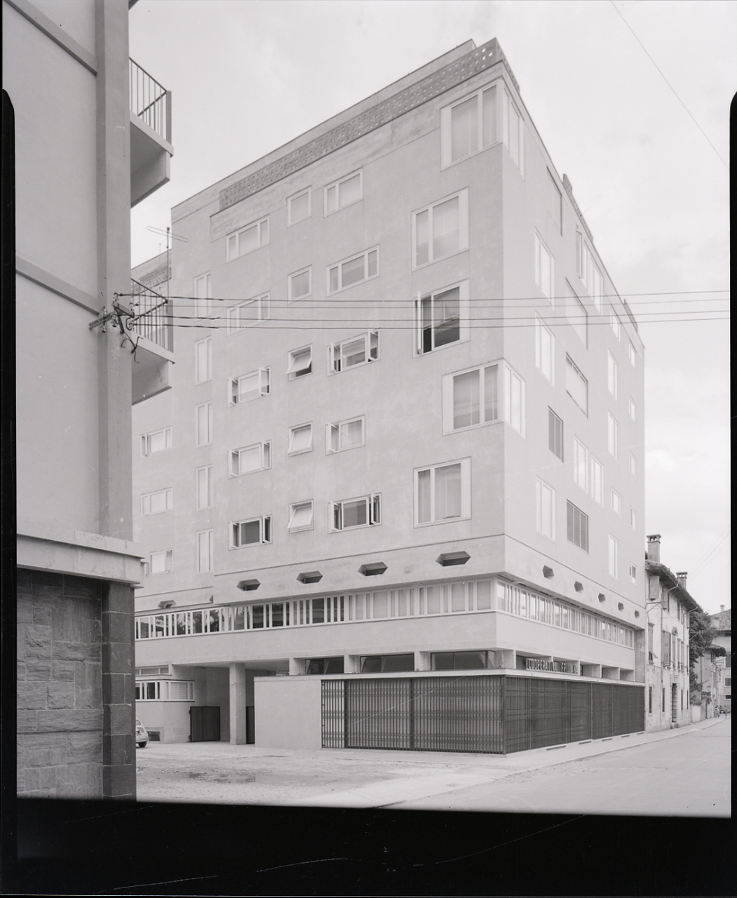 Servizio fotografico : Udine, 1960 / Paolo Monti. - Buste: 16, Fototipi: 18 : Negativo b/n, gelatina bromuro d'argento/ pellicola ; 10x12. - ((Serie costituita da 16 buste sciolte di negativi identificati con una doppia numerazione (da 1 a 16): 1849, 1850, 1851, 1852, 1853, 1854, 1855, 1856, 1857, 1858, 1859, 1860, 1861, 1862, 1863, 1864, 1865, 1866. - Sulla busta identificata con la numerazione 1849/50 iscrizione didascalica manoscritta a pennarello. - Sul coperchio della scatola iscrizione documentaria manoscritta a pennarello nero: "Casabella". - Occasione: Documentazione per pubblicazione su periodico "Casabella", Milano, Domus. - Fonte: Quaderno ad anelli di Paolo Monti: s.t. [Soggetti e committenti] (1956-1961), presso Archivio Paolo Monti. In data 1960/10/14 annotazione manoscritta: "Inviate a Casabella n.15 30x40". - Fonte: Monografia di Fleming John, Honour Hugh, Pevsner Nikolaus: Dizionario d'architettura, Torino, Einaudi (1981). - Fonte: Periodico: Casabella, Milano, Domus (s.d.). - Fonte: Fogli pinzati di Paolo Monti: I. Carteggi/ Einaudi/ Elenco foto disponibili per il Dizionario di Architettura (s.d.), presso Archivio Paolo Monti